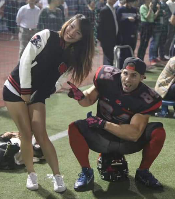 Eric Grover and his wife at an American Football game in Shanghai, China (2015)